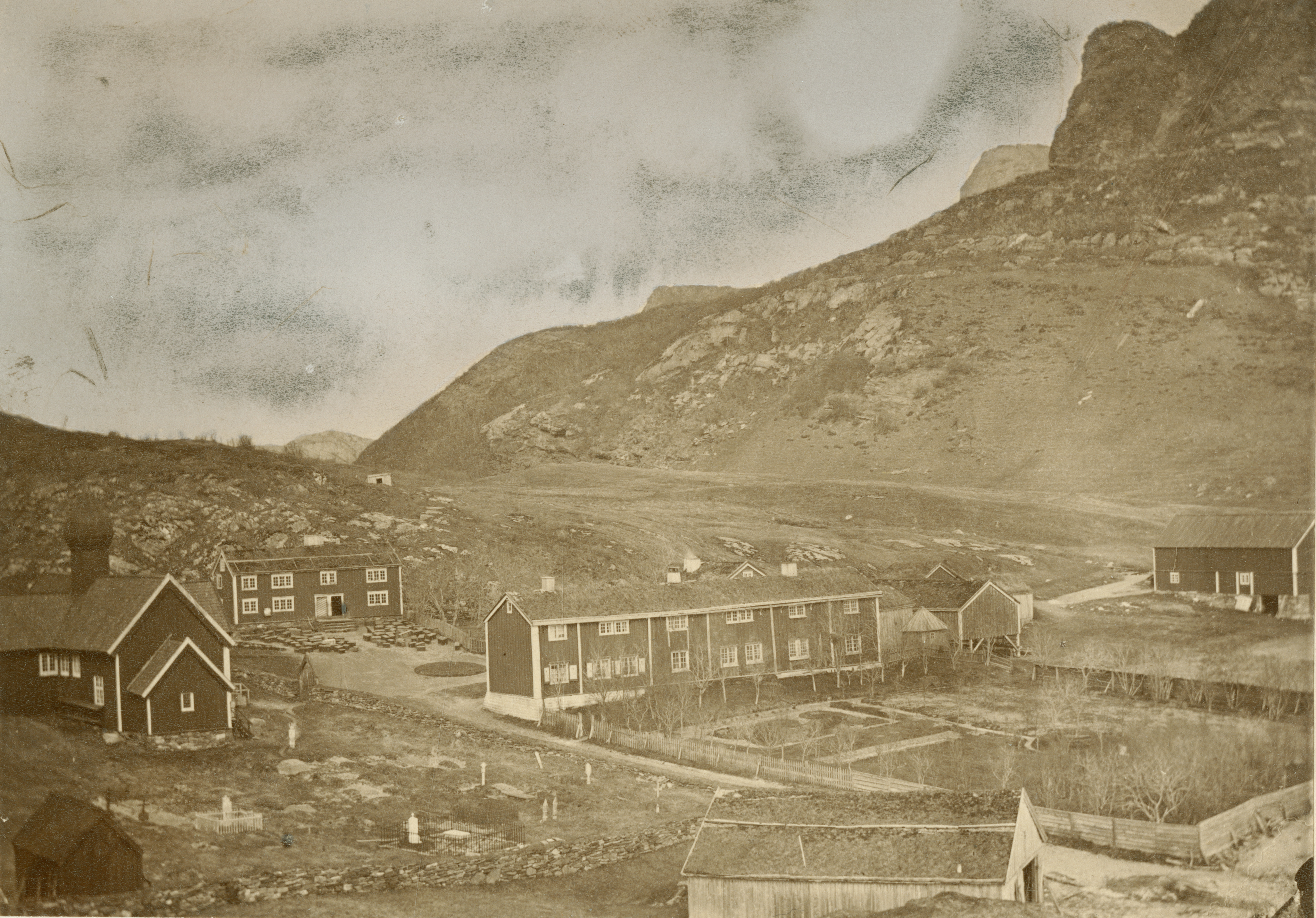 Rødøy kirke, den gamle i Rødøy, Nordland Revet 1885